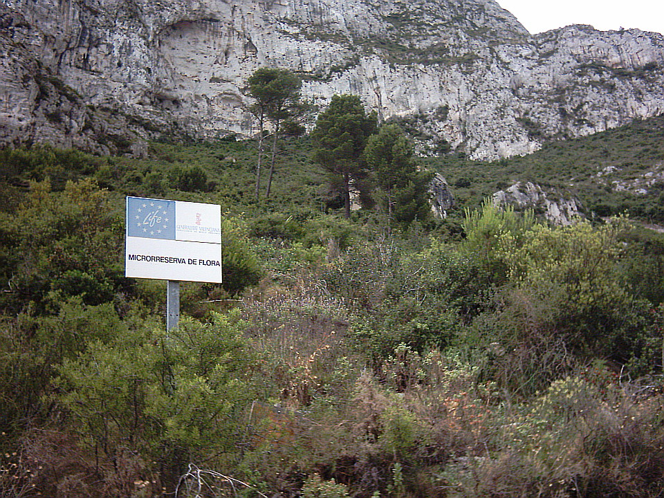 Microrreserva de flora (según Natura 2000) de la Cova de l'Aigua, Parque Natural del Montgó, Denia (Alicante), Spain